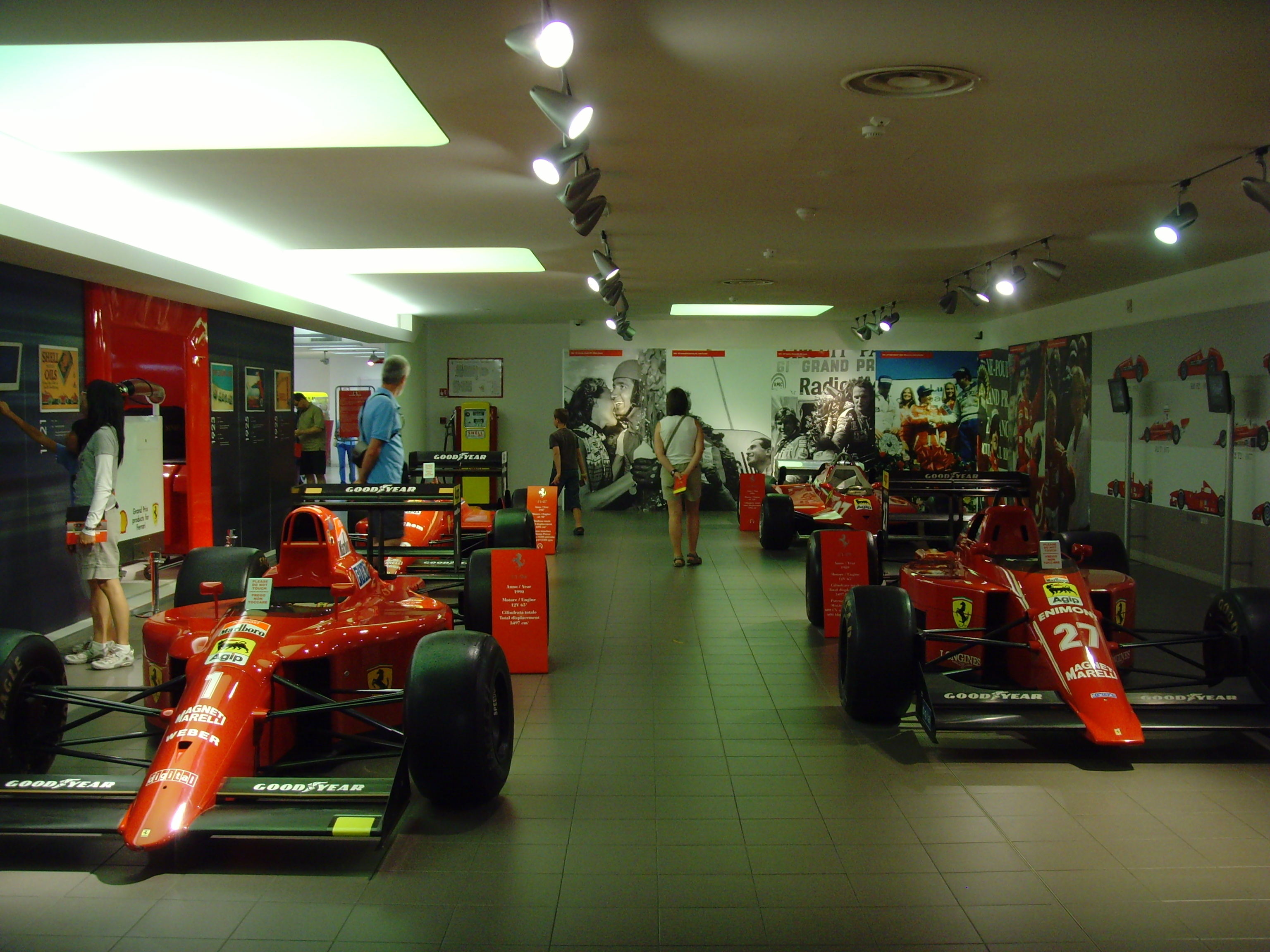 Galleria Ferrari